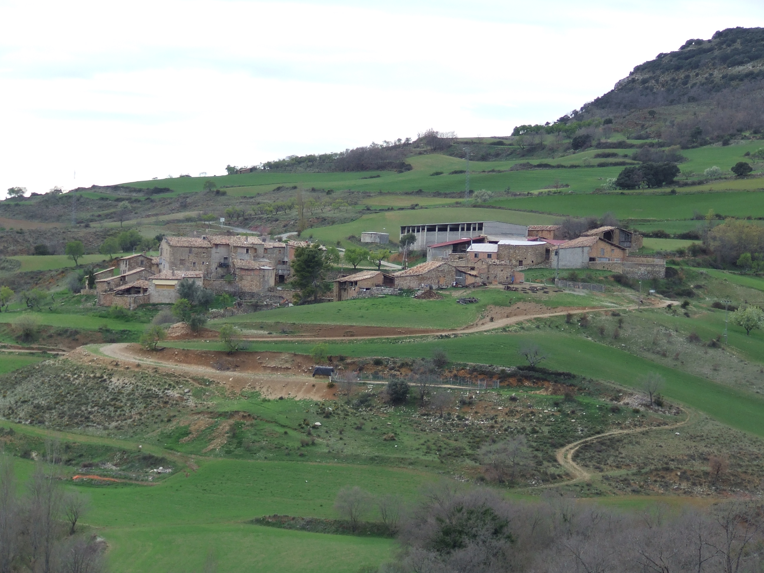 Sant Esteve de la Sarga, vista general (Pallars Jussà)